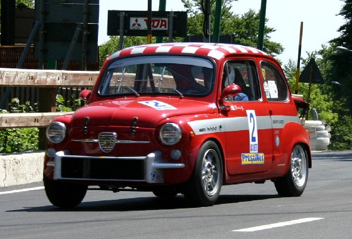 Abarth 1000 TC La foto è stata scattata il 3 luglio 2004 alle prove della Coppa Carotti. presumo GFDL